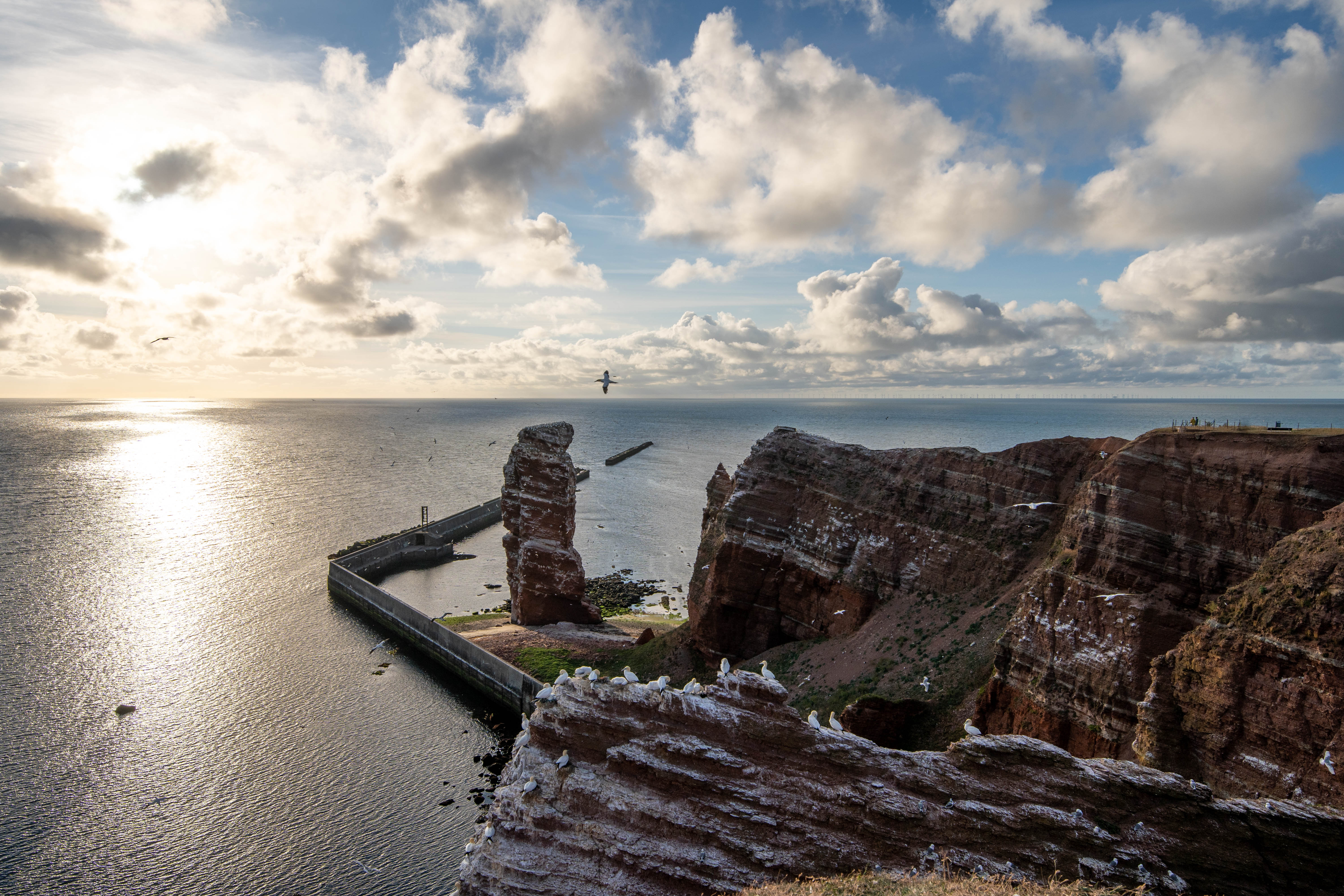 Der direkte Blick vom Lummenfelsen zum Wahrzeichen Helgolands, der Lange Anna (Nathurn Stak)